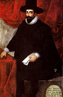 Huari fue fundado durante el gobierno del virrey Francisco de Toledo.